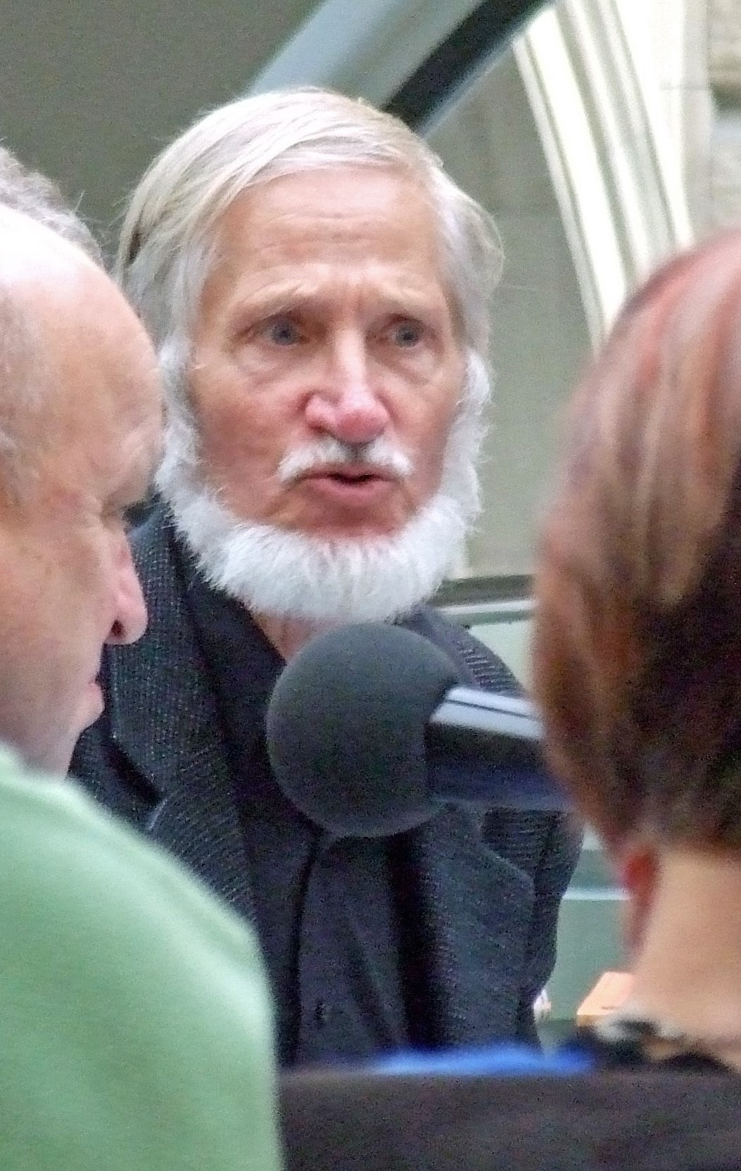 Rupert Neudeck, bei einer öffentlichen Veranstaltung